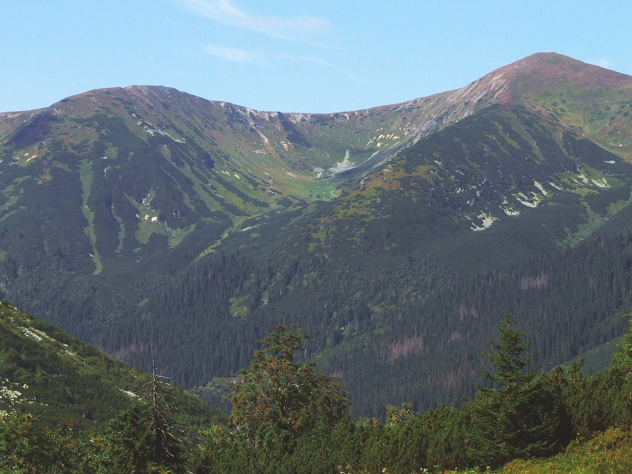 U góry Zadni Goły wierch Liptowski, Turkowa Przełęcz i Wielka Kopa Koprowa. Pomiędzy nimi Dolina Turkowa, w dole Dolina Koprowa. Widok z Doliny Hlińskiej